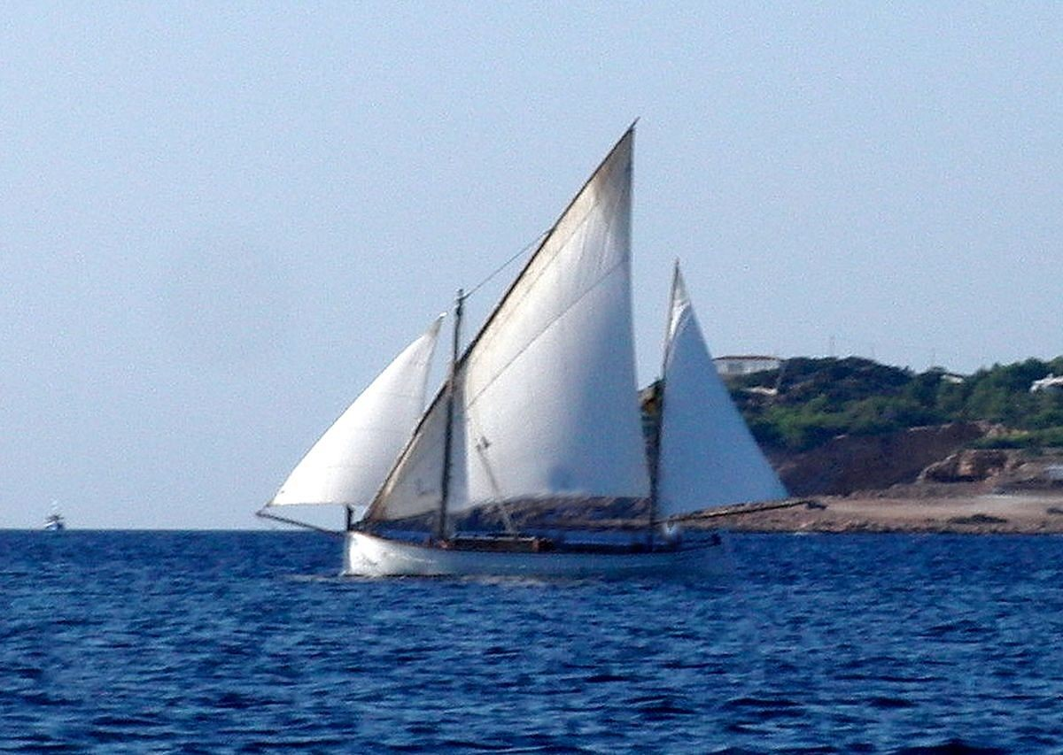 Klassisches Holzboot der Balearen, Llaüt 'Querida Lolita', mit Lateinersegel in der Bucht von Sant Antoni de Portmany vor Ibiza.